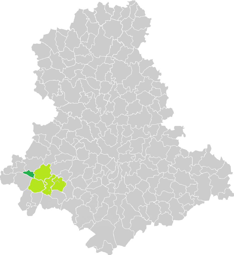 Carte de situation de la commune de Saint-Bazile (en vert foncé) dans le votre Canton (en vert clair) sur une carte des communes de la Haute-Vienne